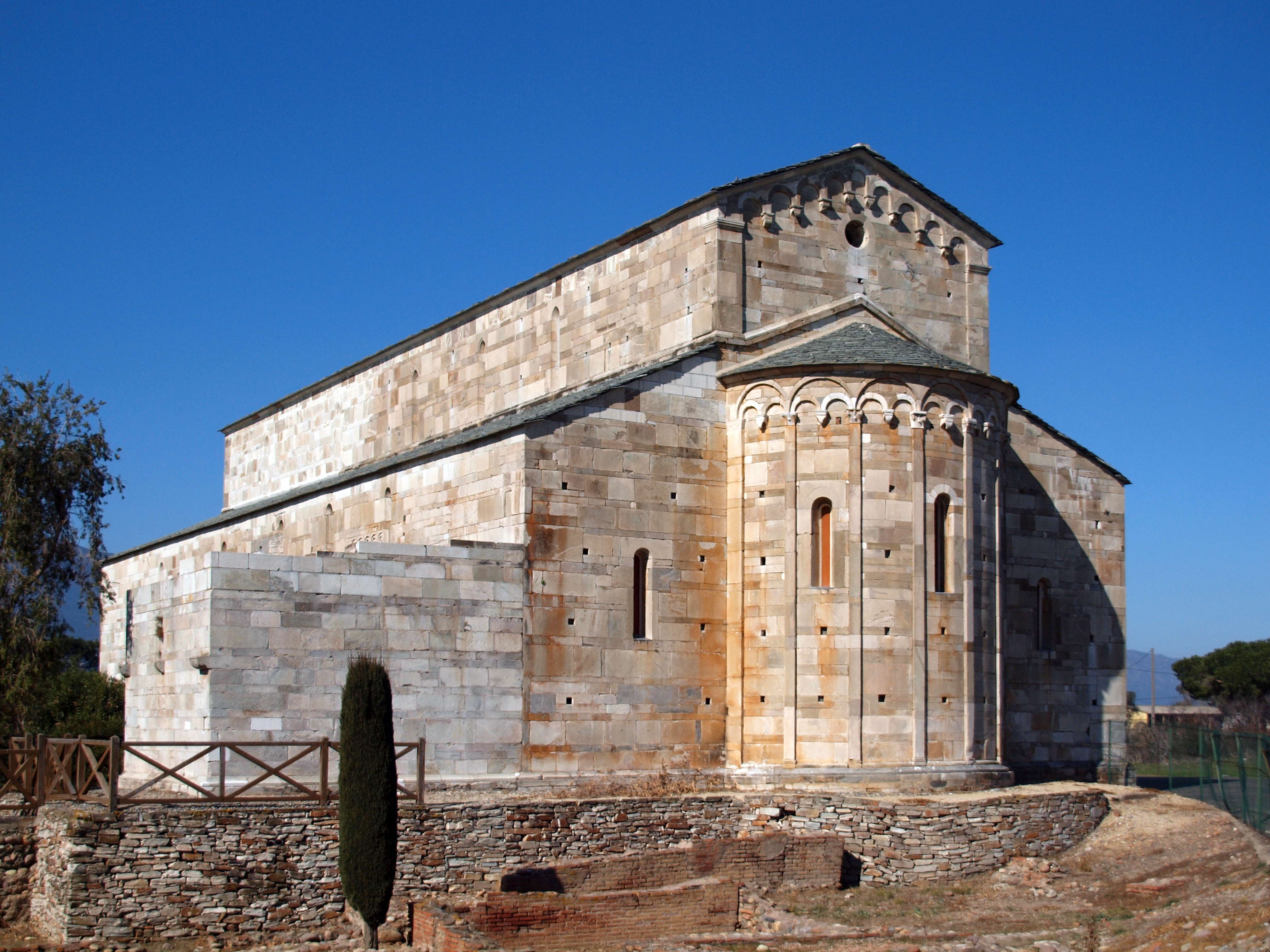 Lucciana (Corse) - Chevet de la cathédrale Santa-Maria-Assunta fondée au XIe siècle sur le site archéologique de Mariana à « La Canonica»